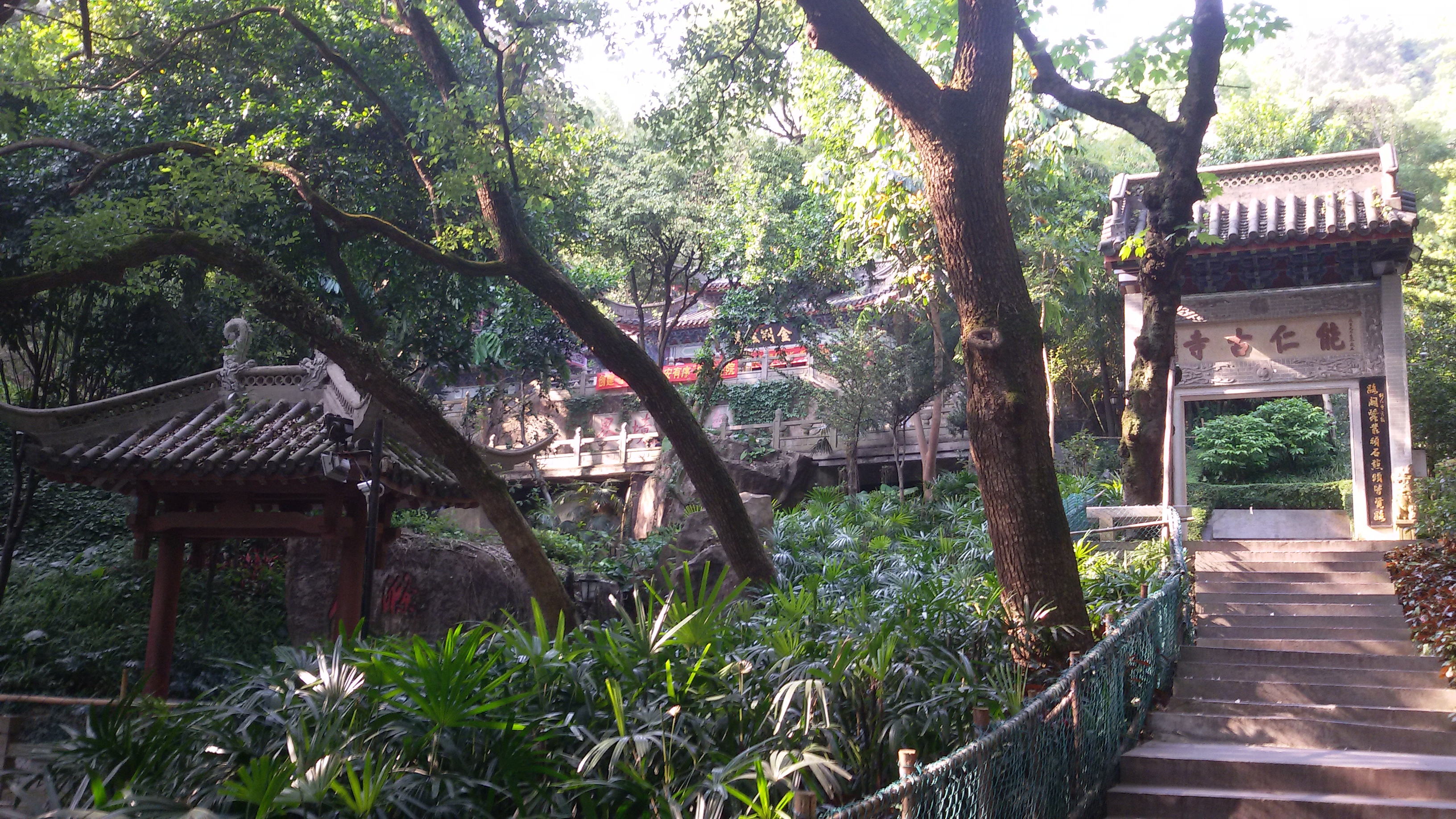 粵語: 能仁寺入面嘅寺院景区